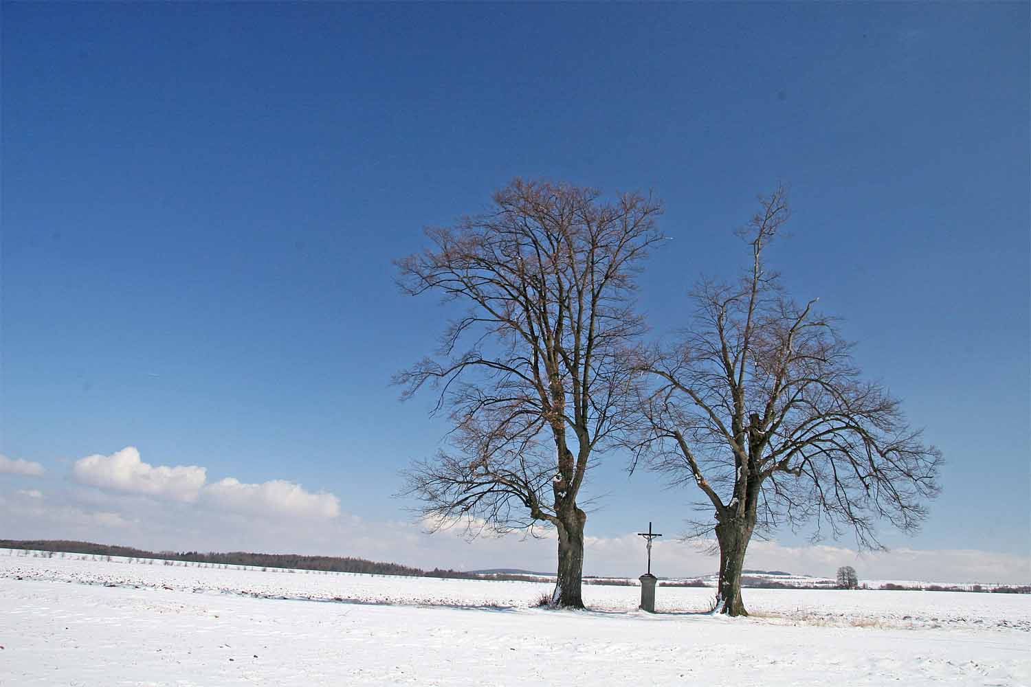 Skupina dvou památných lip malolistých u křížku v poli u obce Červený Hrádek v okrese Kolín